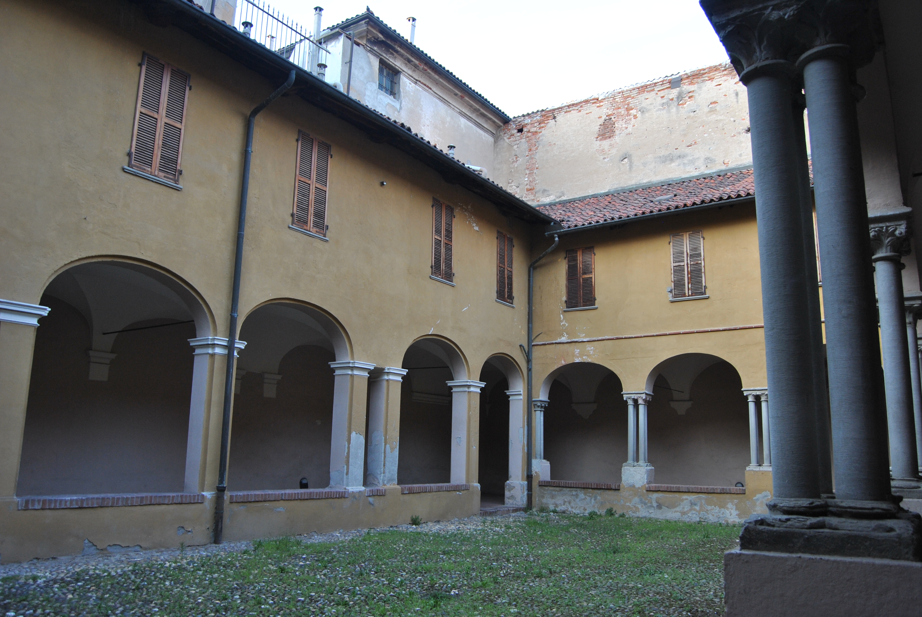 chiostro San Graziano vercelli